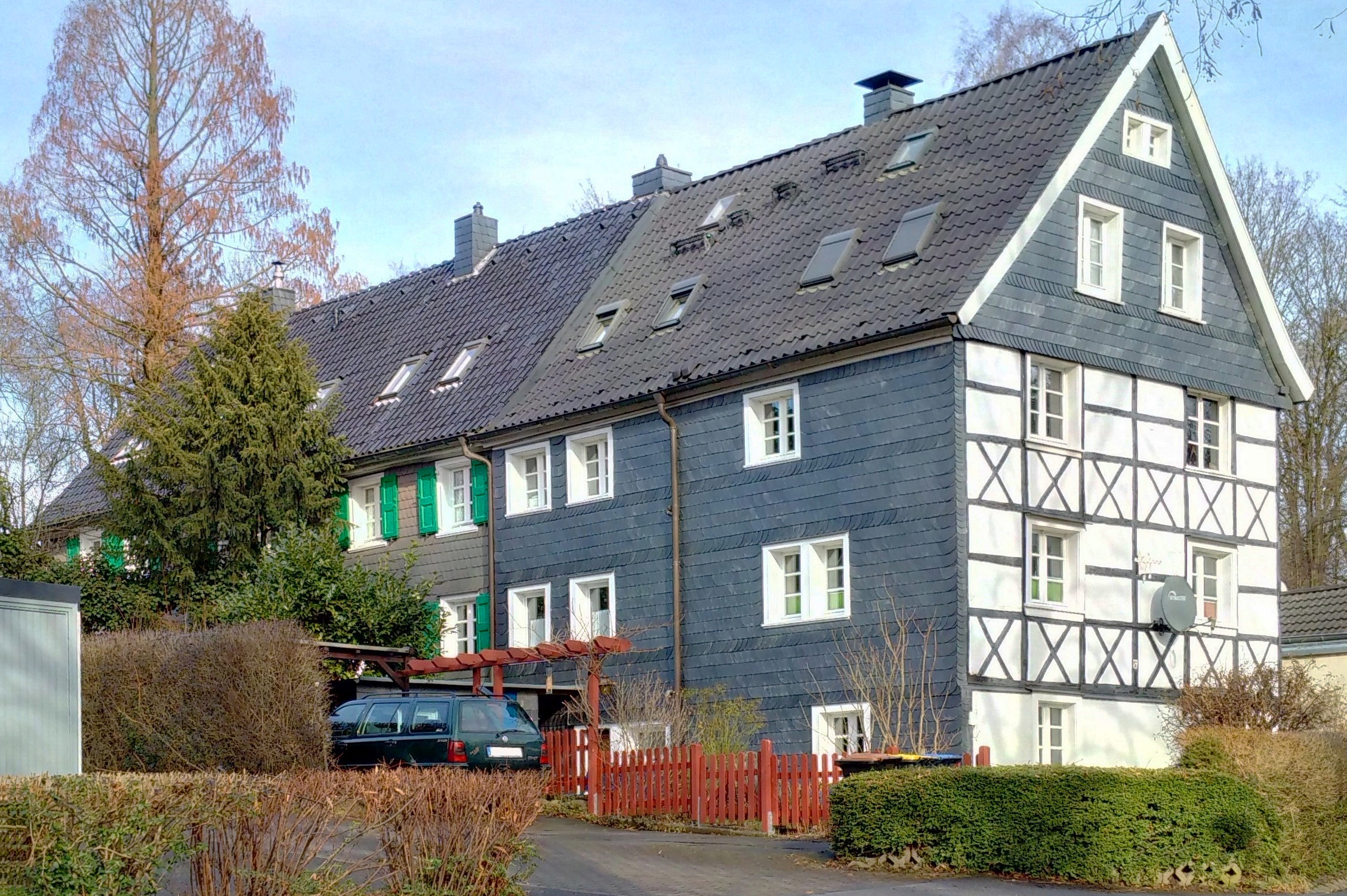 Baudenkmal Virchowstraße 18-24 in Solingen-Scharrenberg, aufgenommen im Winter 2016/2017